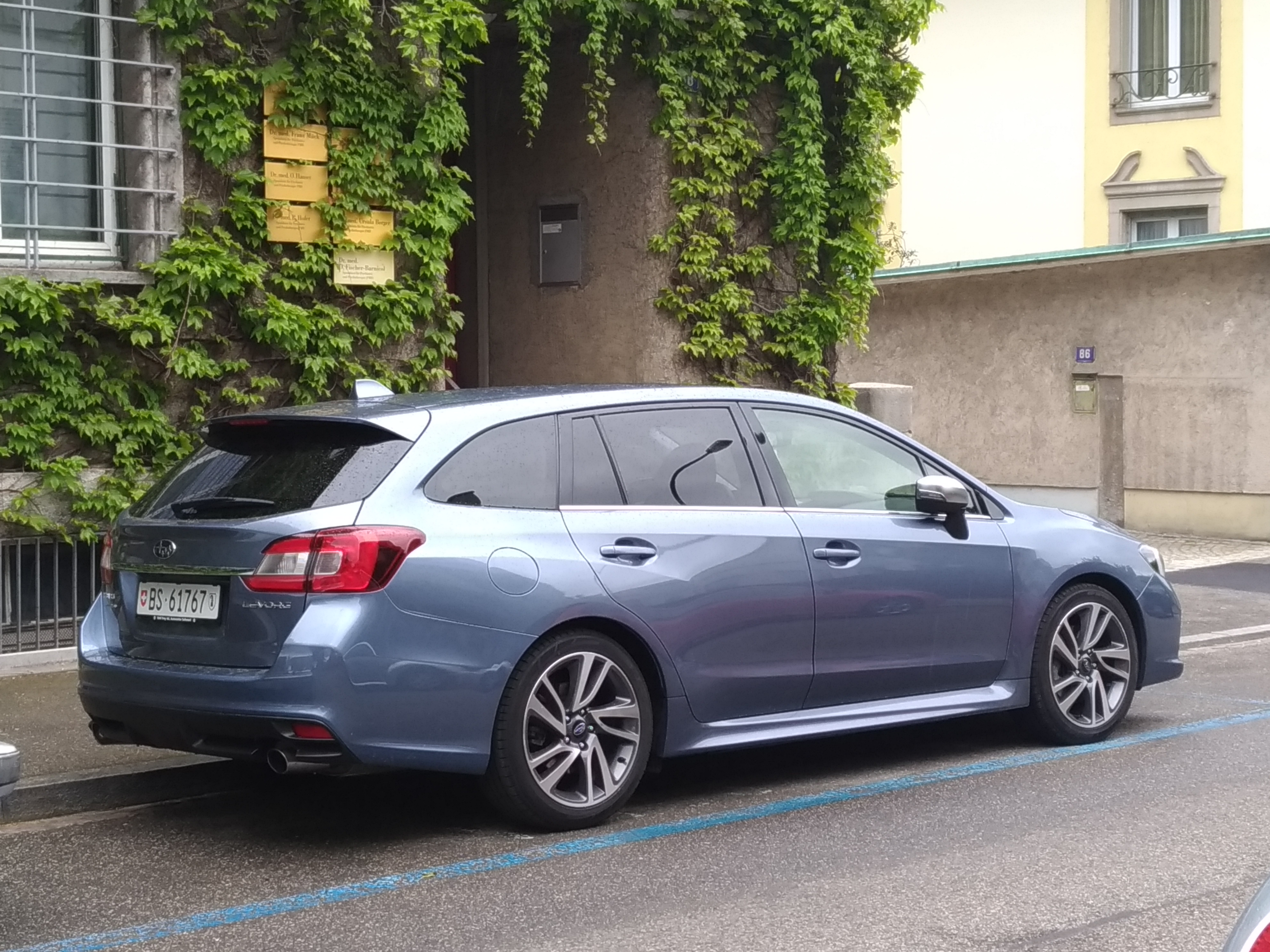 Subaru Levorg at Basel